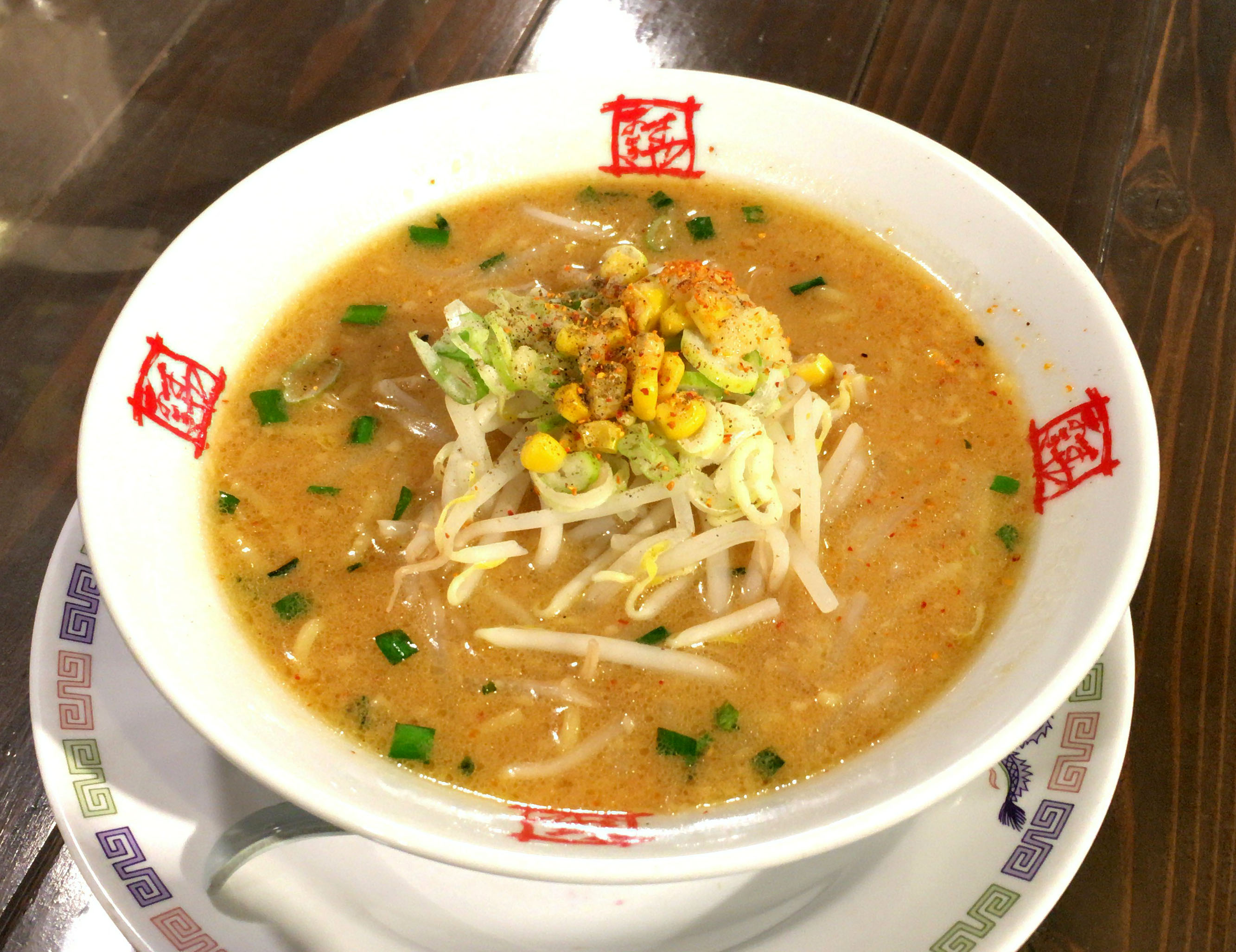 おおぎやの「みそラーメン」